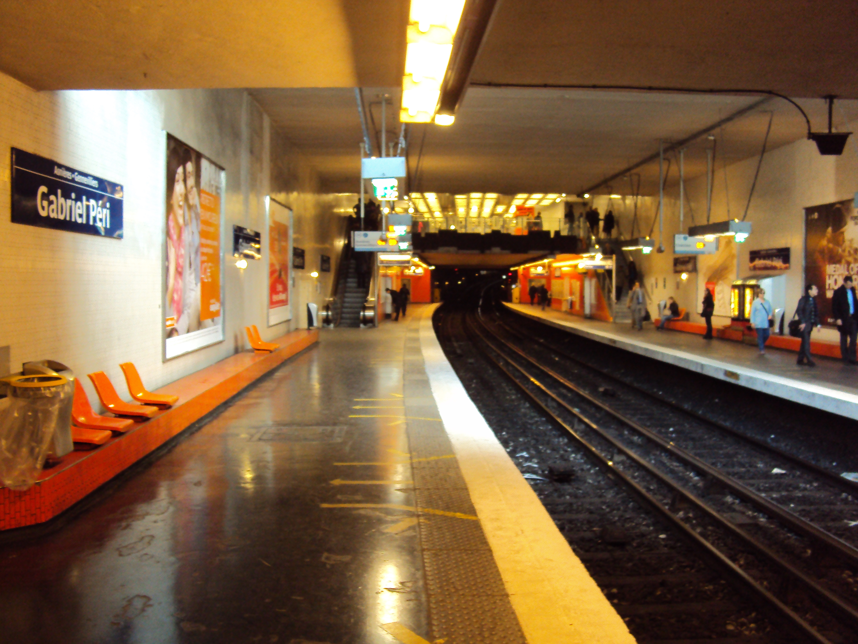 Station de Métro Gabriel Péri - Asnières-Gennevilliers